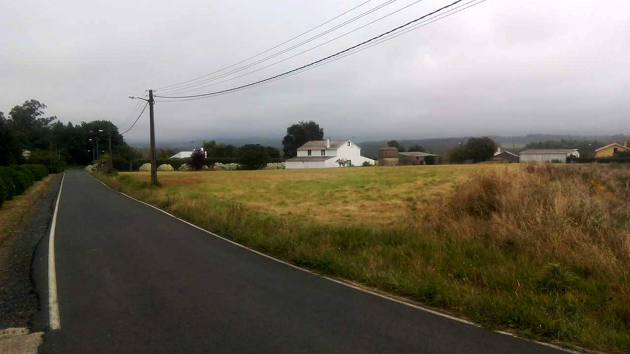 Vista do Vento, O Val.